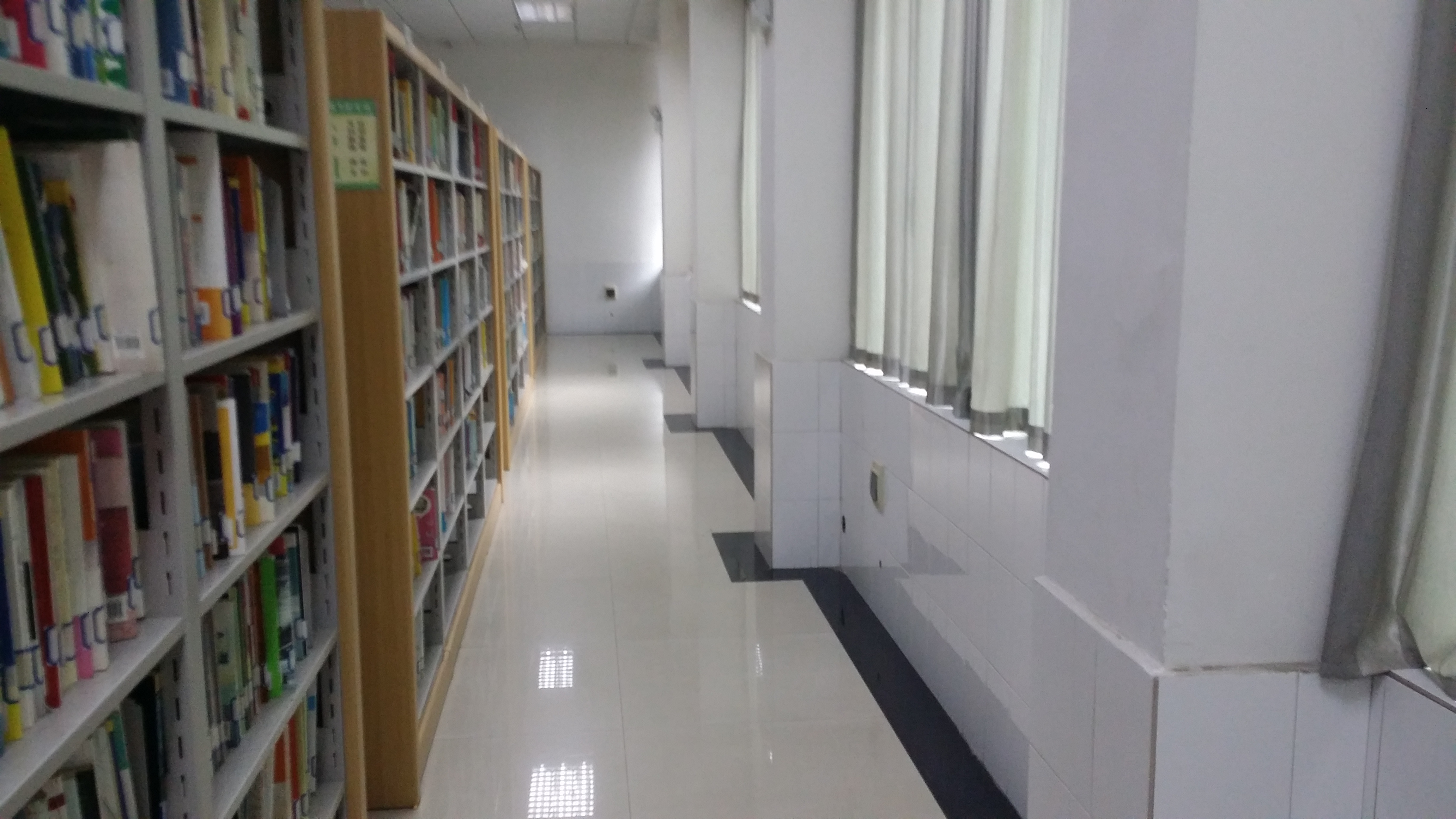 衡阳市图书馆的借阅室